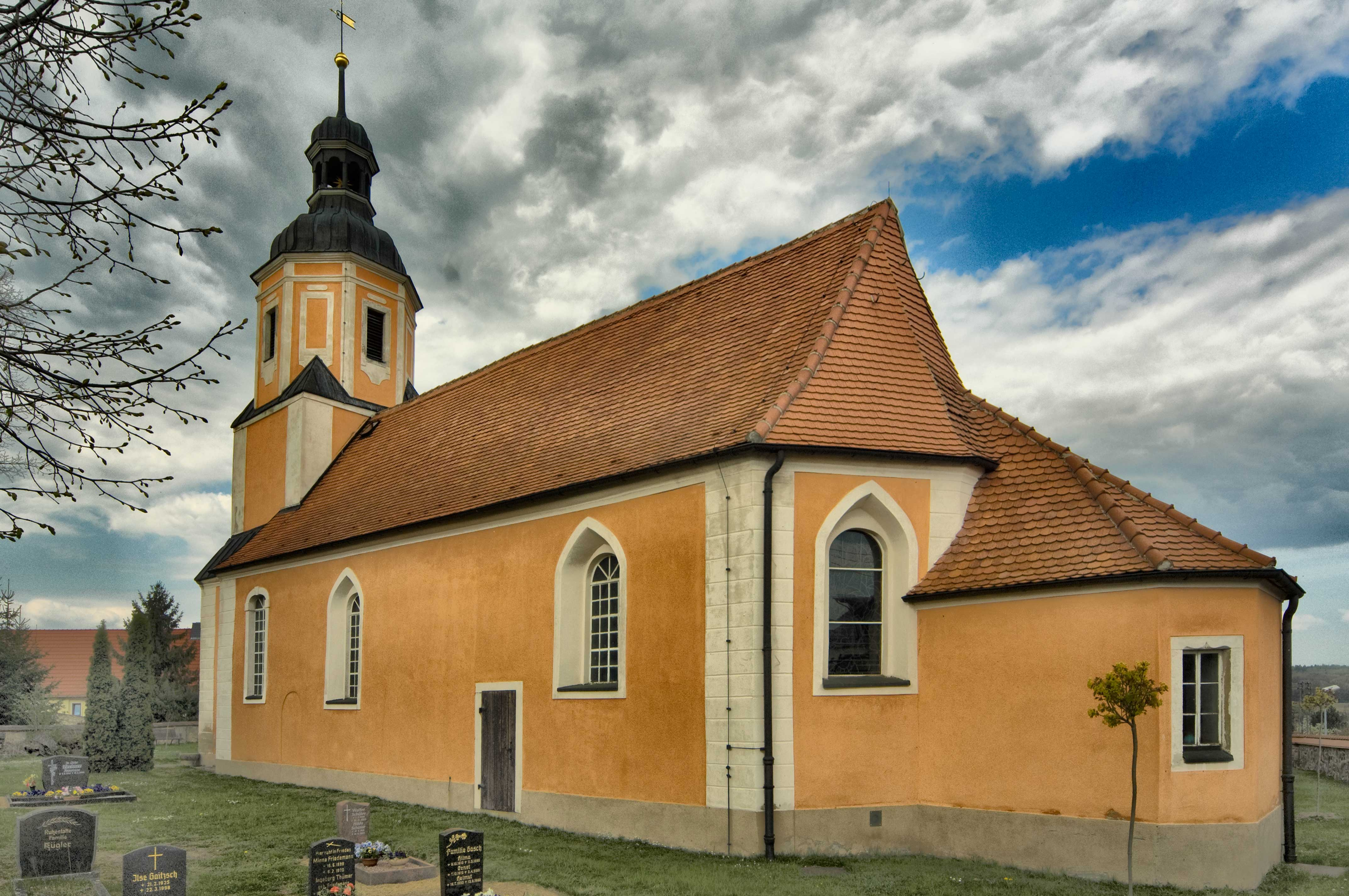 Kirche in Lampersdorf, Gemeinde Wermsdorf in Sachsen